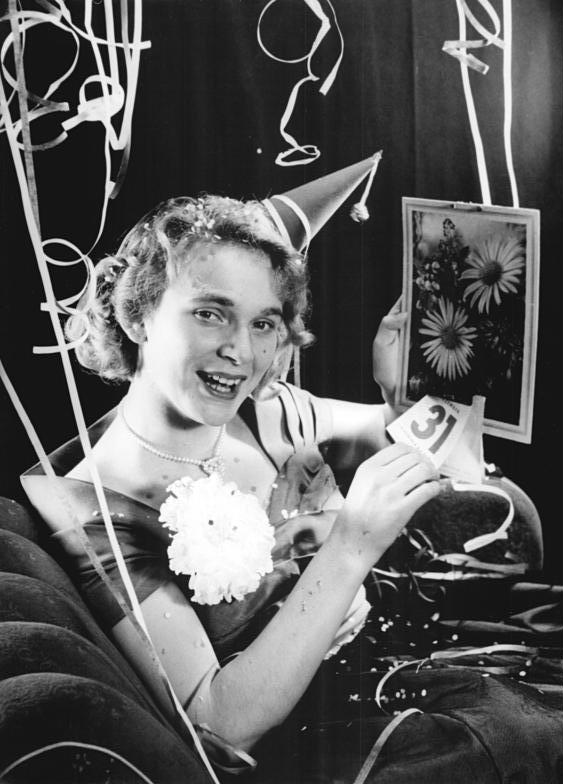 Neujahrsfest Zentralbild Quasch-Weiß 20.12.1955 We-Ri. Zur Jahreswende 1955 1956. "Finden Sie nicht auch, das Jahr 1955 ist doch eigentlich schnell vergangen. Nur noch wenige Stunden, und wir werden das letzte Blatt vom Kalender lösen können. Das stimmt uns aber nicht traurig, denn wenn wir weiterhin tatkräftig mithelfen, wird uns auch das Jahr 1956 neue grosse Erfolge bringen.